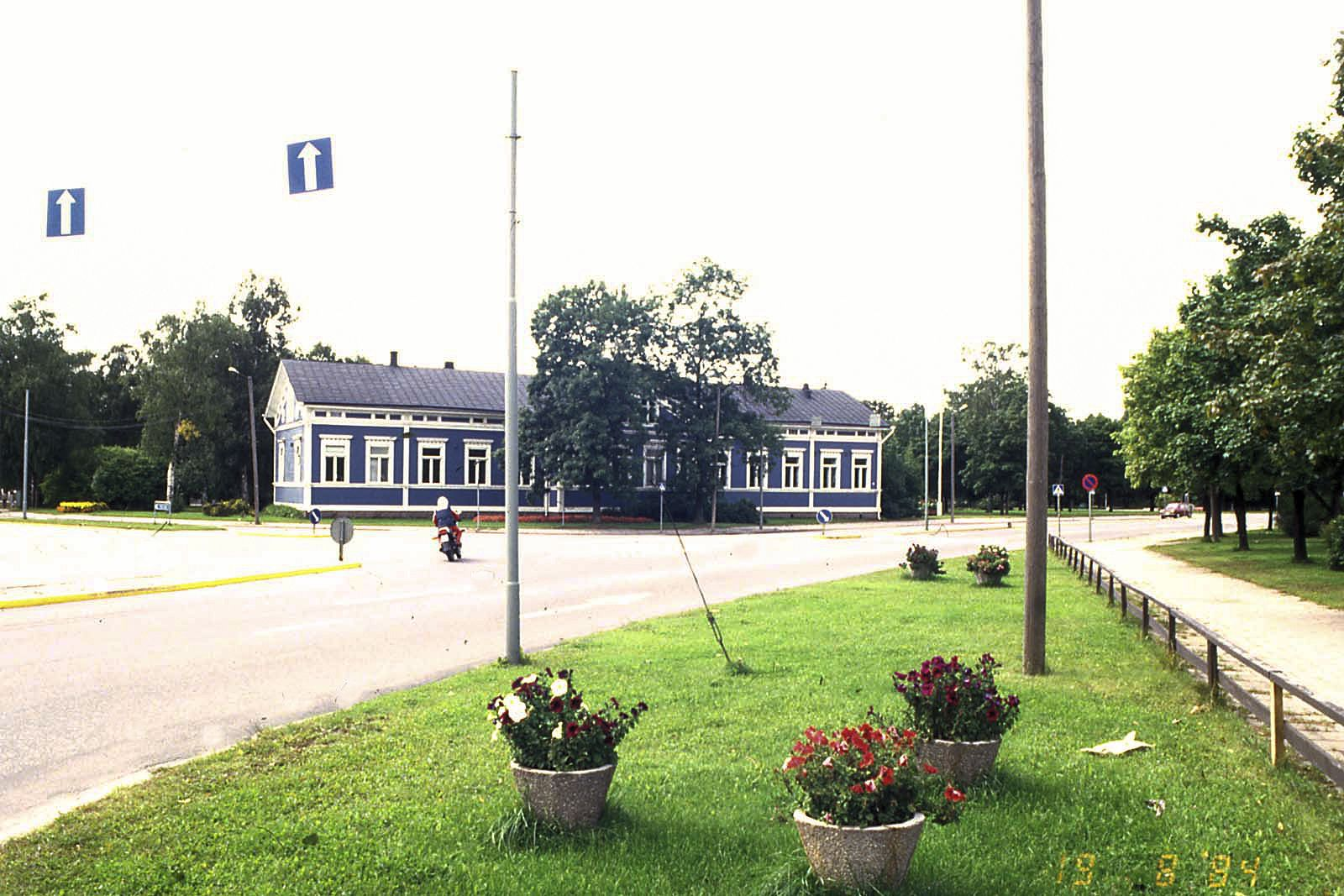 Salon vanha kaupungintalo